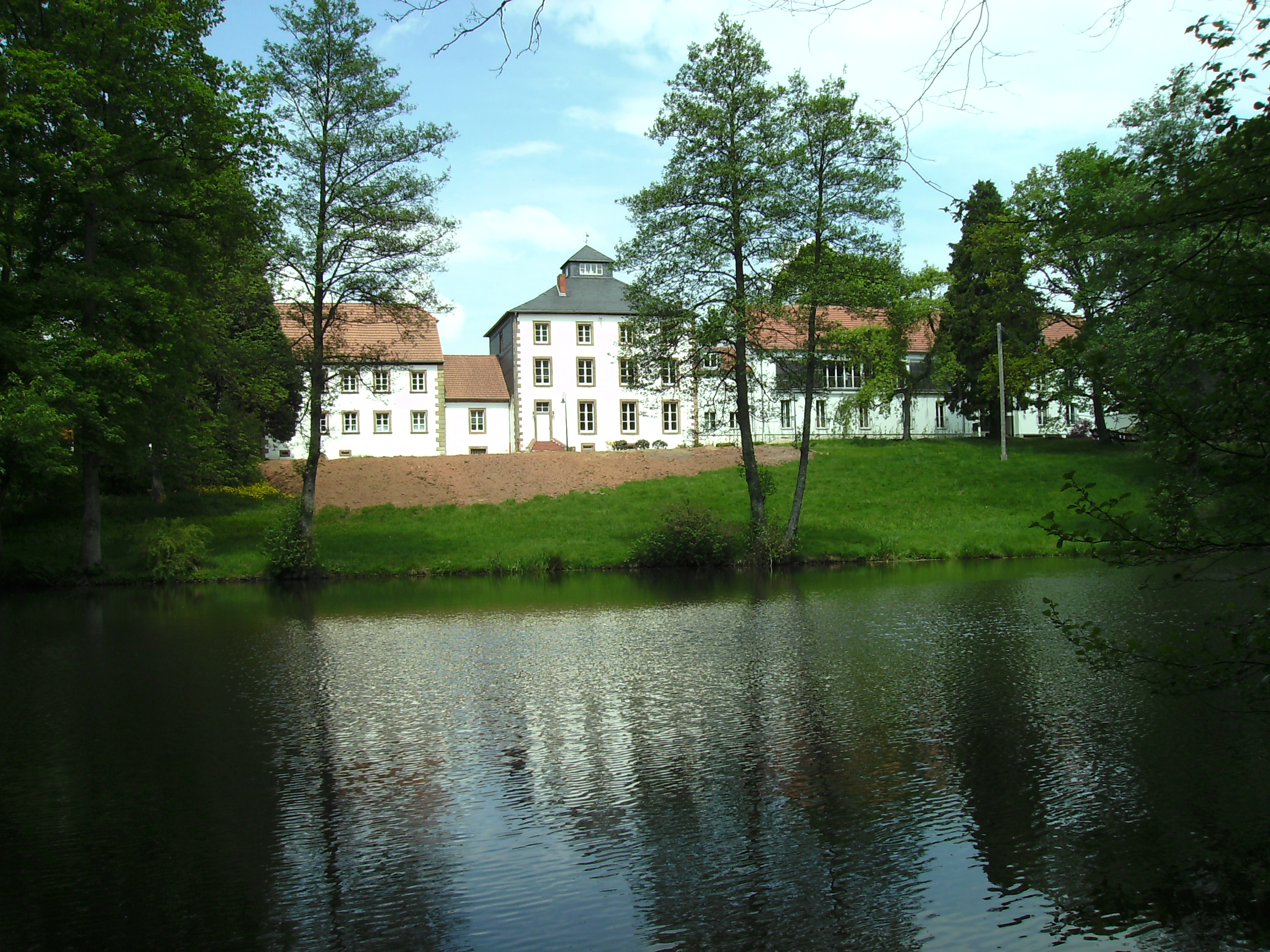 Hofgut Imsbach: Hotelkomplex mit Gutsweiher